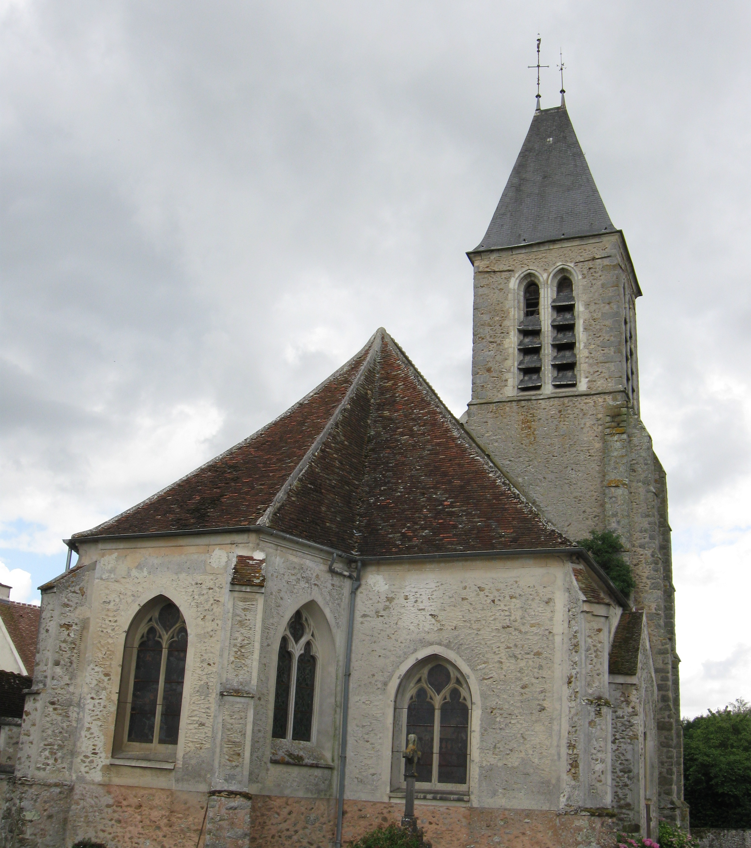 L'église Notre-Dame-de-l’Assomption d'Aulnoy. (Seine-et-Marne, région Île-de-France).